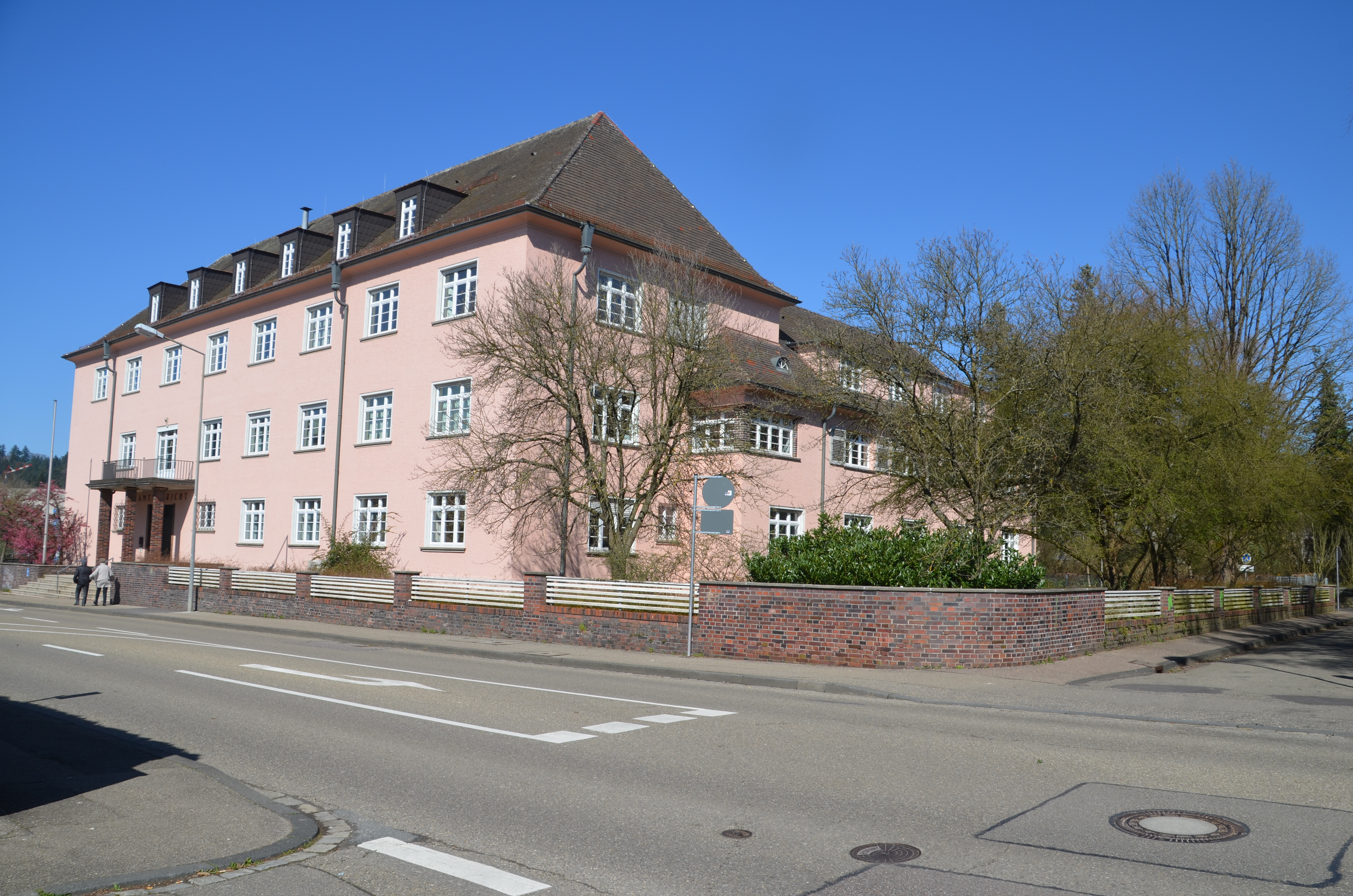 Amtsgericht Schwäbisch Gmünd von Rektor-Klaus-Straße Ecke Mörikestraße